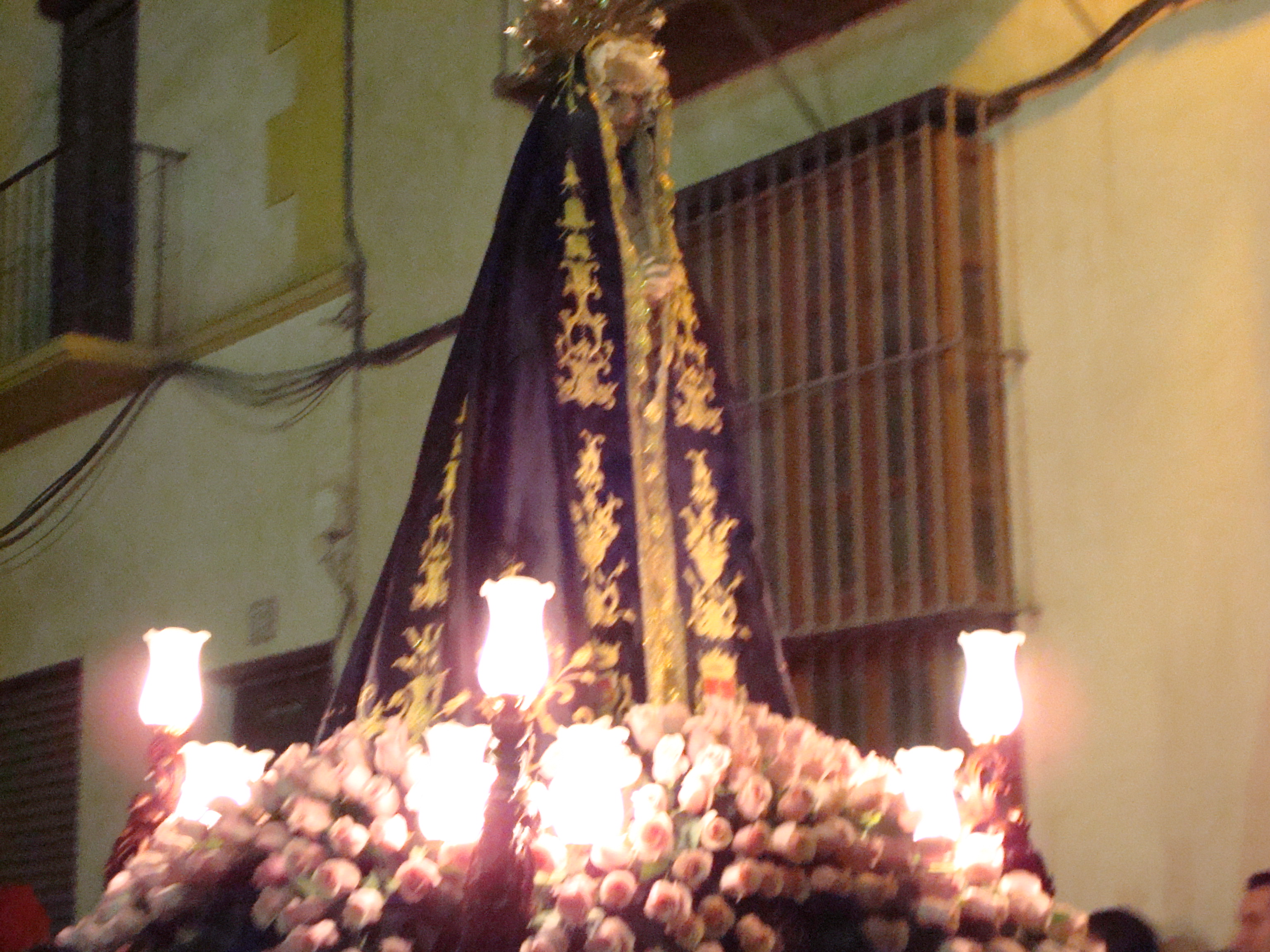 Sabado Santo en Lorca